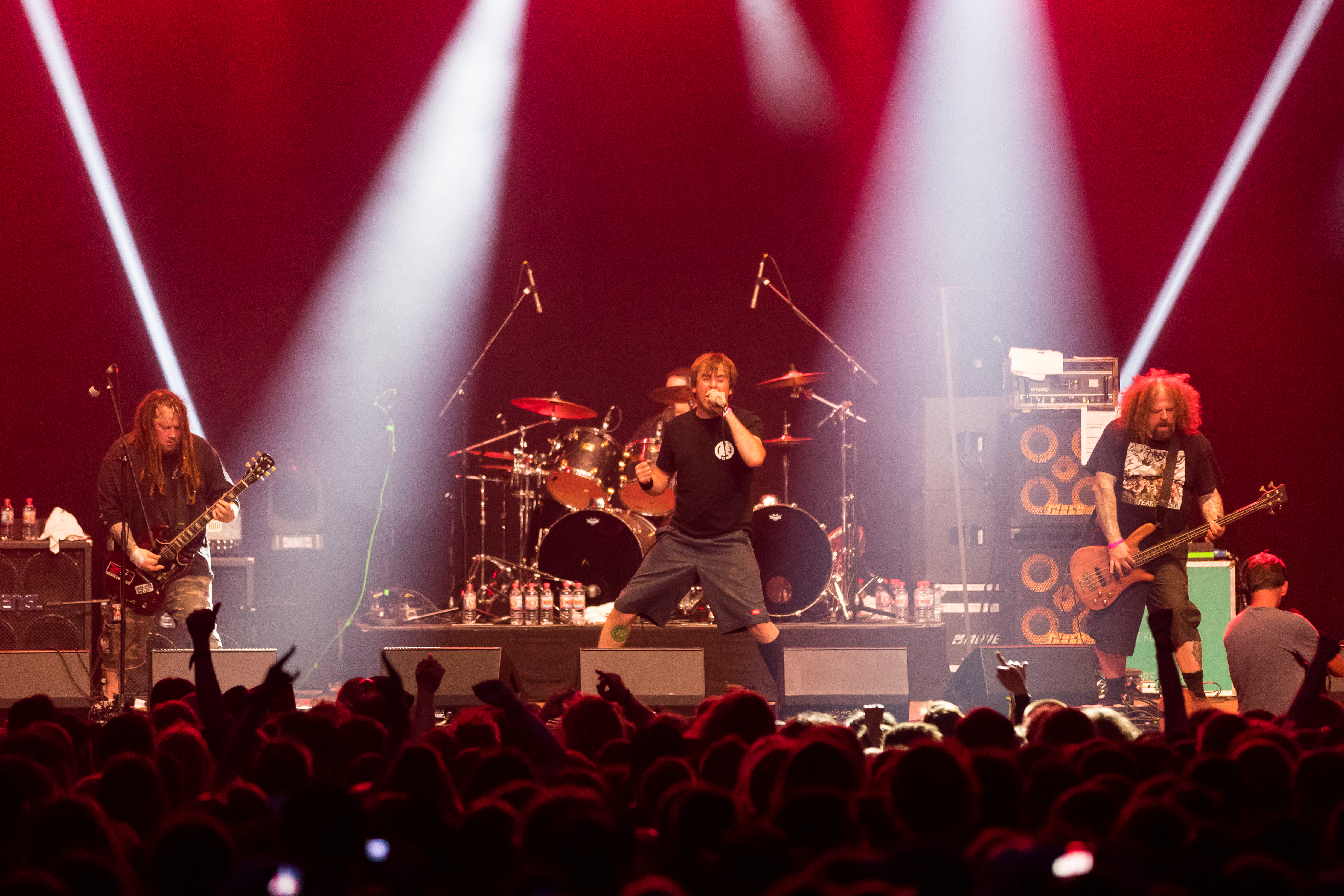 Napalm Death during Wacken Open Air at Schleswig-Holstein, Wacken, , Germany on 2017-08-03, Photo: Sven Mandel